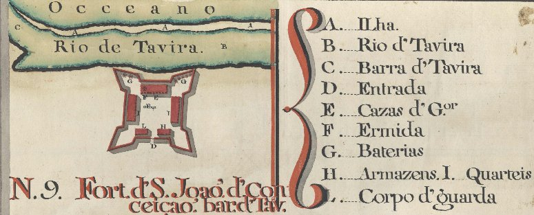 Planta de pormenor do Forte de São João da Barra, junto a Cabanas-de-Tavira, no Algarve, gravura datada de 1784 .